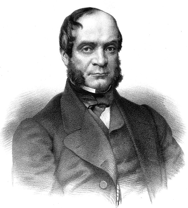 Валериан Платонович Платонов (1809—1893)